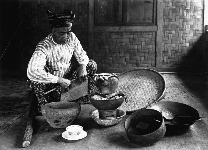 Foto. Een dukun tijdens de bereiding van zijn geneesmiddelen